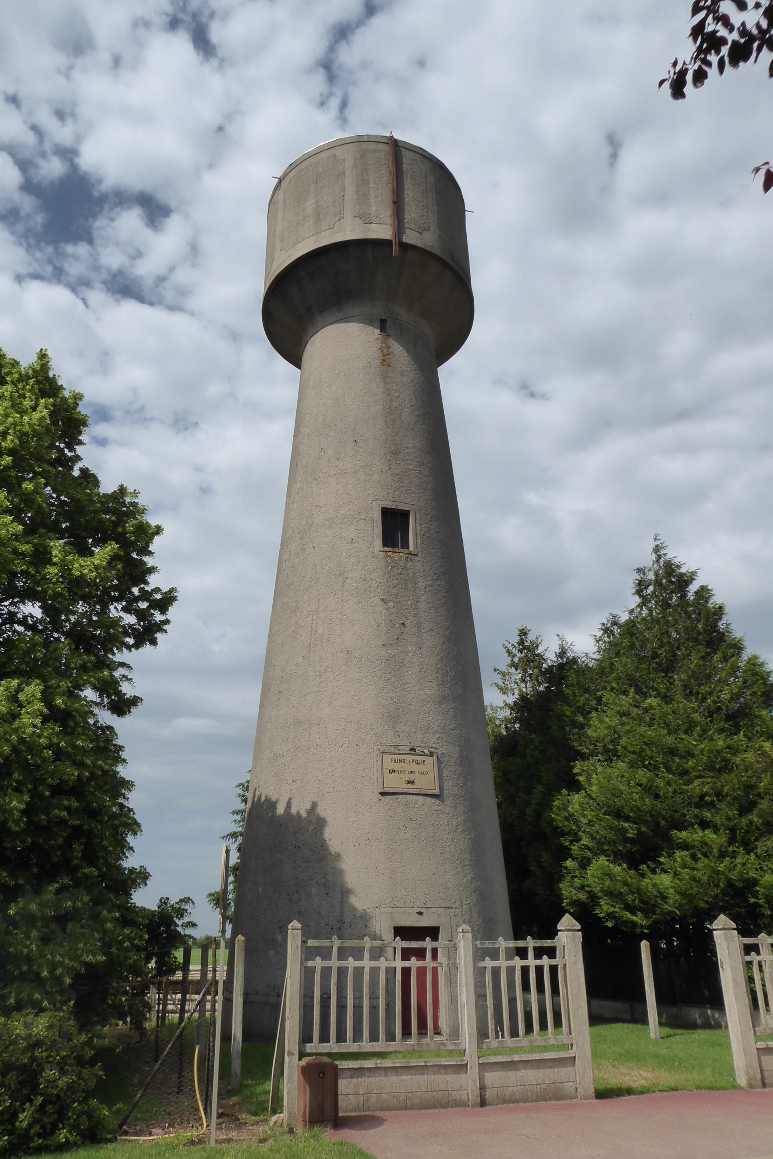 Château d'eau de Fains-la-Folie (1936), Eure-et-Loir, France.